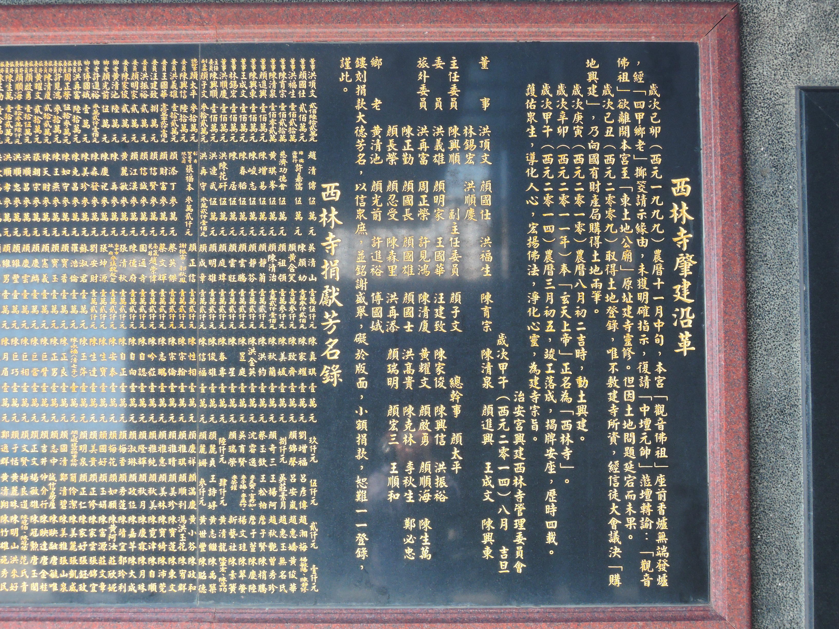 澎湖西嶼鄉大池西林寺，主祀觀音佛祖